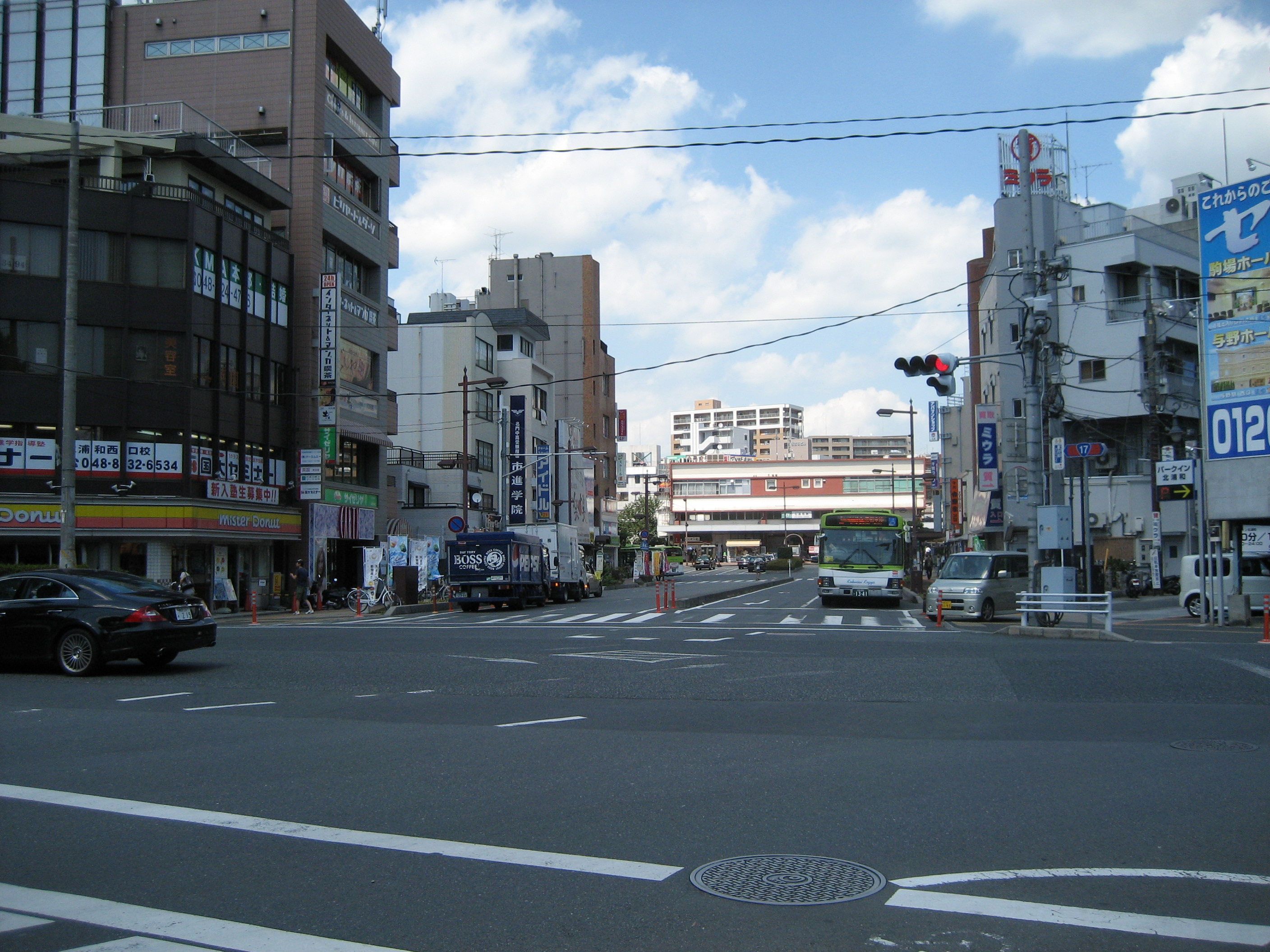 埼玉県道118号線さいたま市浦和区国道17号線との交差点から北浦和駅方向を撮影